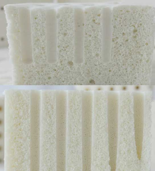 Diferencia del látex obtenido por el proceso Dunlop y el proceso Talalay